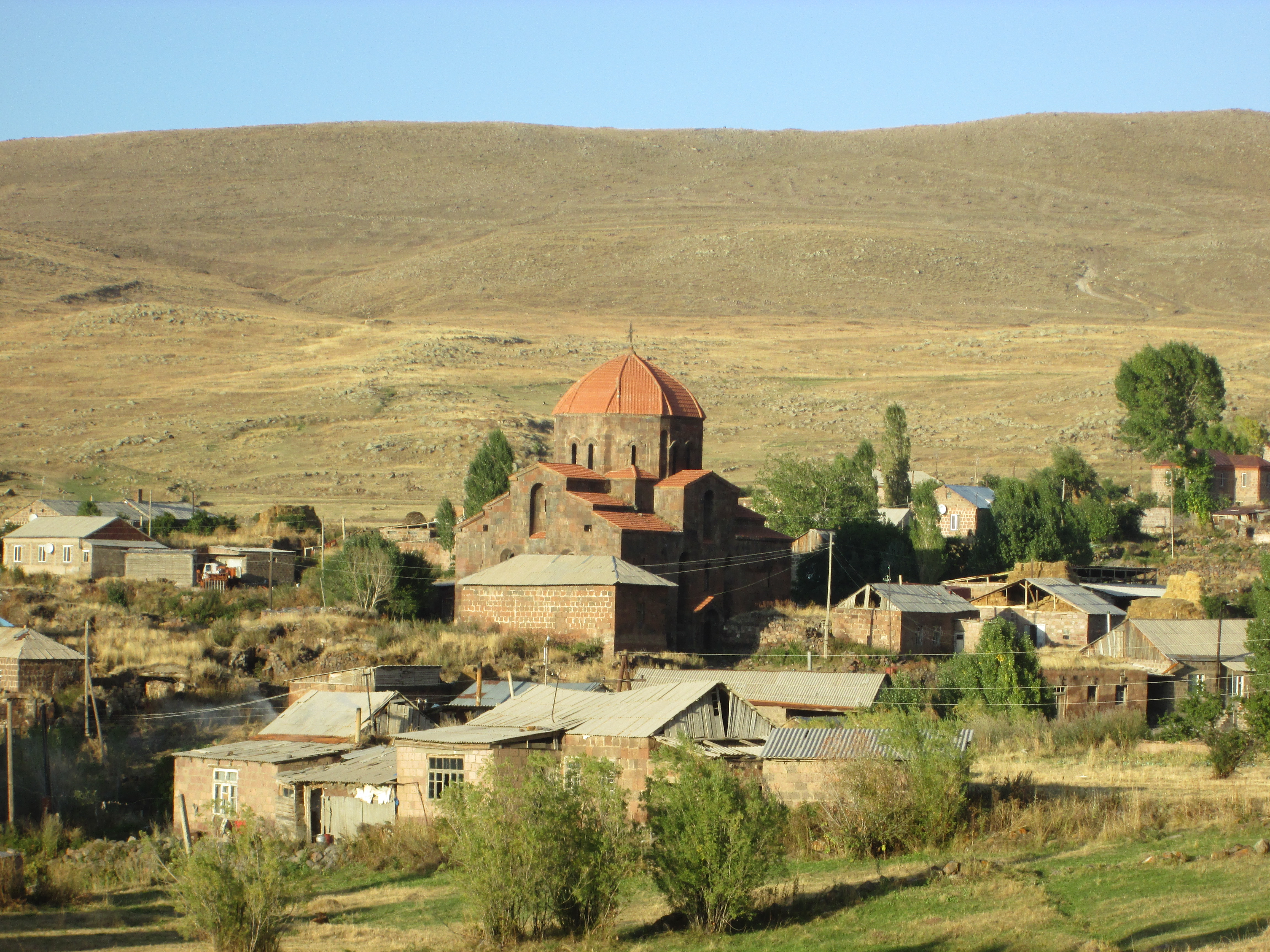 Ս. Գևորգ եկեղիցի, Գառնահովիտ, 7-րդ դար 29/8